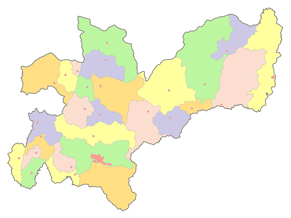 mapa politico de Caldas